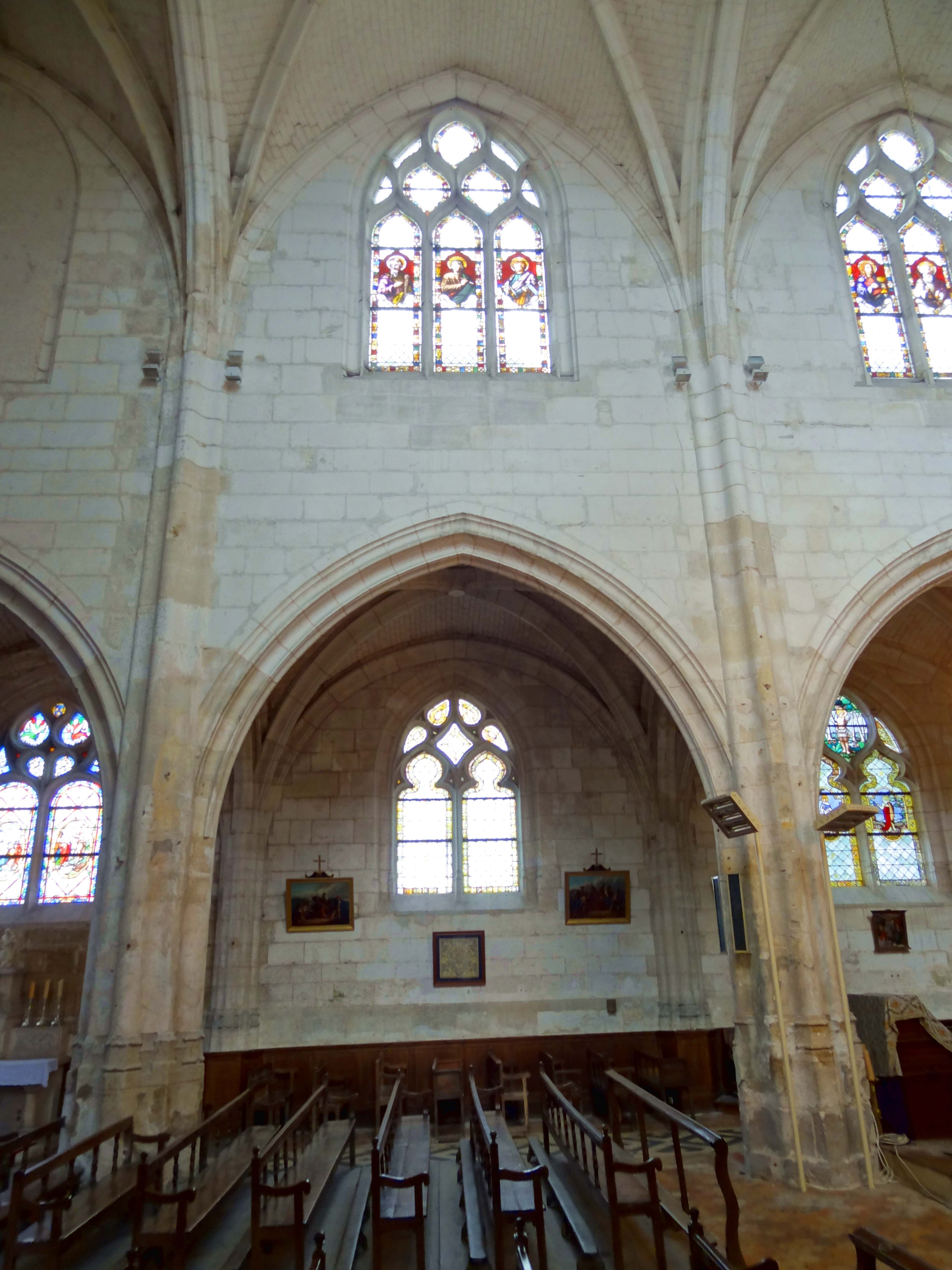 Intérieur de l'église - voir titre.